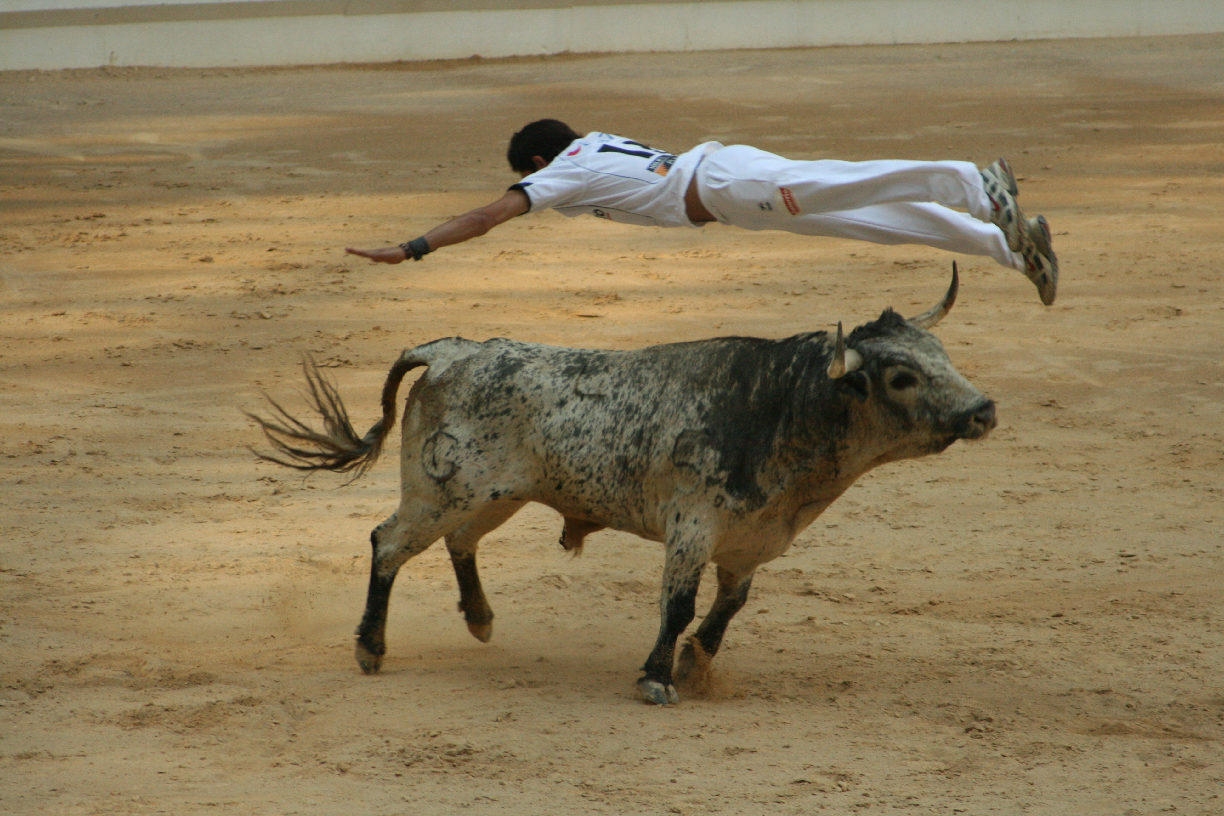 Un hombre, recortador, realiza una pirueta sobre un toro.